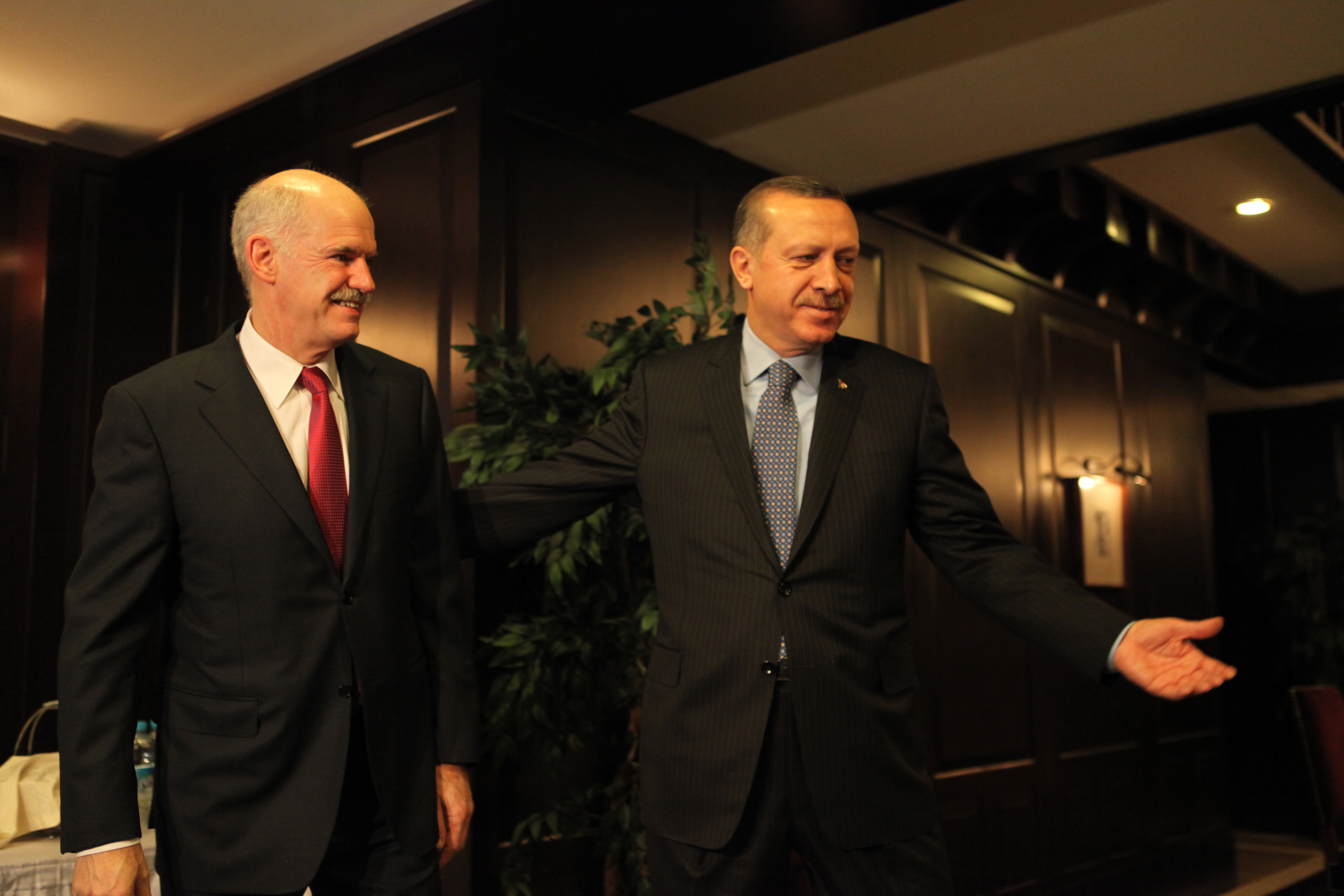 Turkish Prime Minister Recep Tayyip Erdoğan and Greek Prime Minister Giorgos Papandreou. Location: Hotel "Dedeman Palandöken" in Erzurum, Turkey.